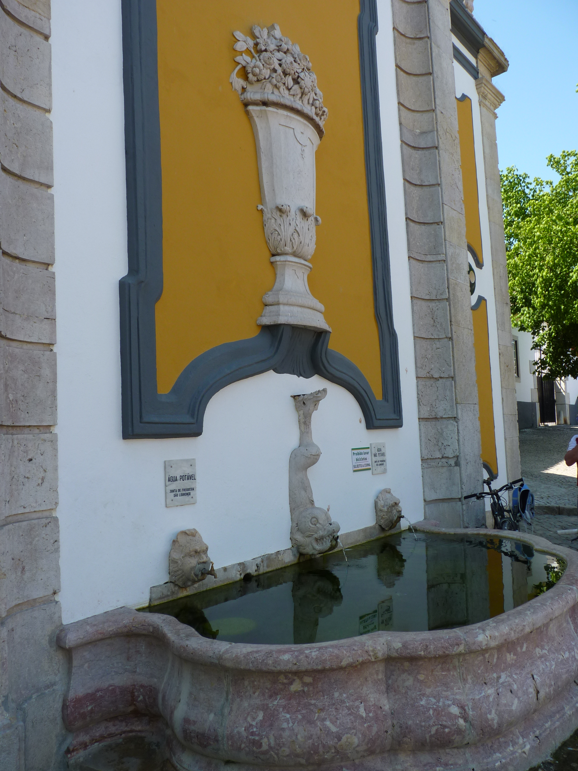 Fontanário em Vila Nogueira de Azeitão This file was uploaded for Wiki Loves Monuments in Portugal with the unique identifier 71510.